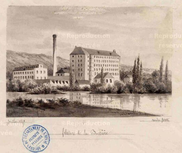 Flavigny-le-Grand-et-Beaurain La filature de La Bussière